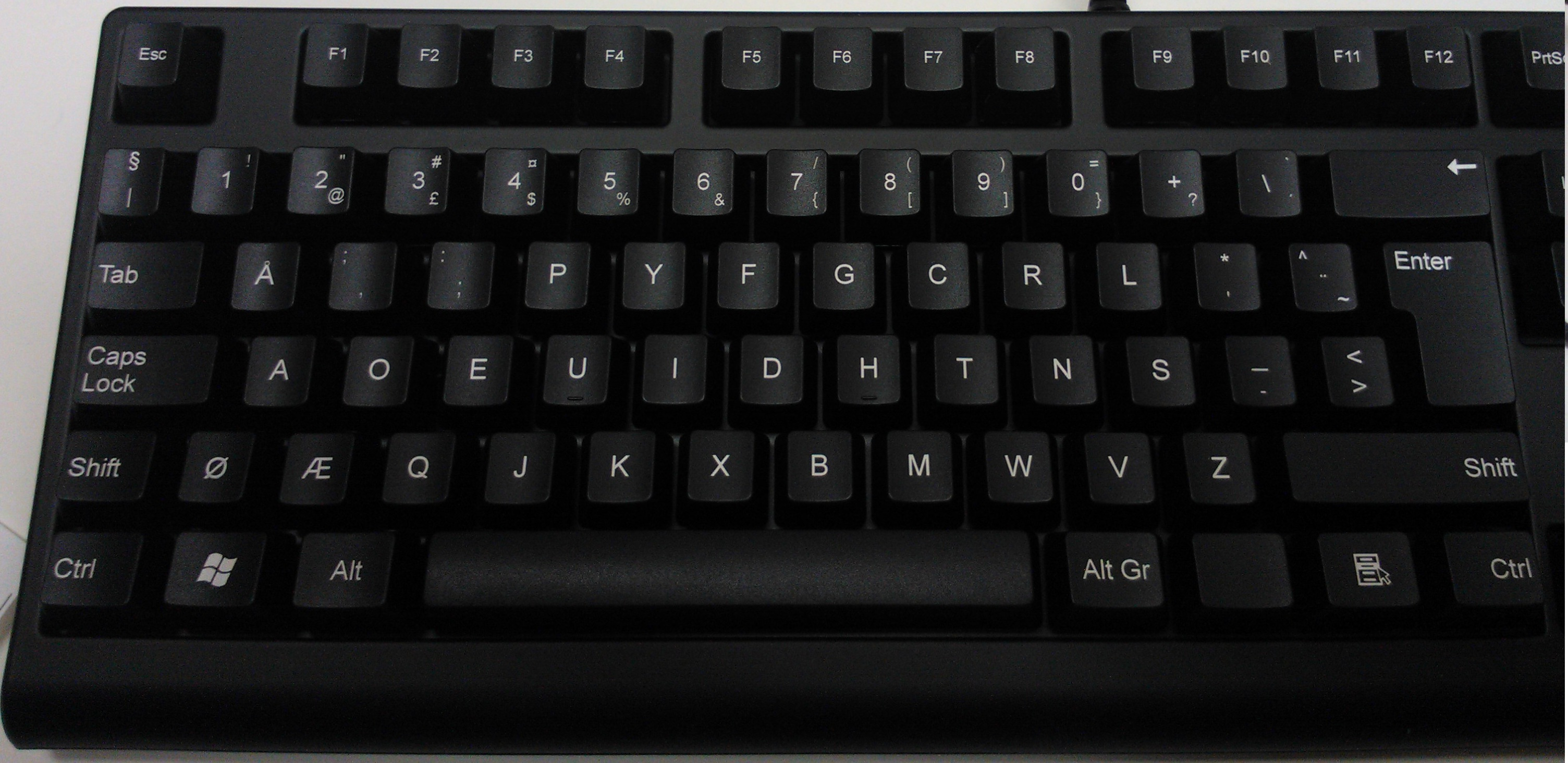 Et originalt norsk dvorak-tastatur (riktig nok spesialbestilt), slik at fingermerkene er på riktig sted, på U og H, i stedet for på F og J, som det er i vanlig Qwerty-oppsett